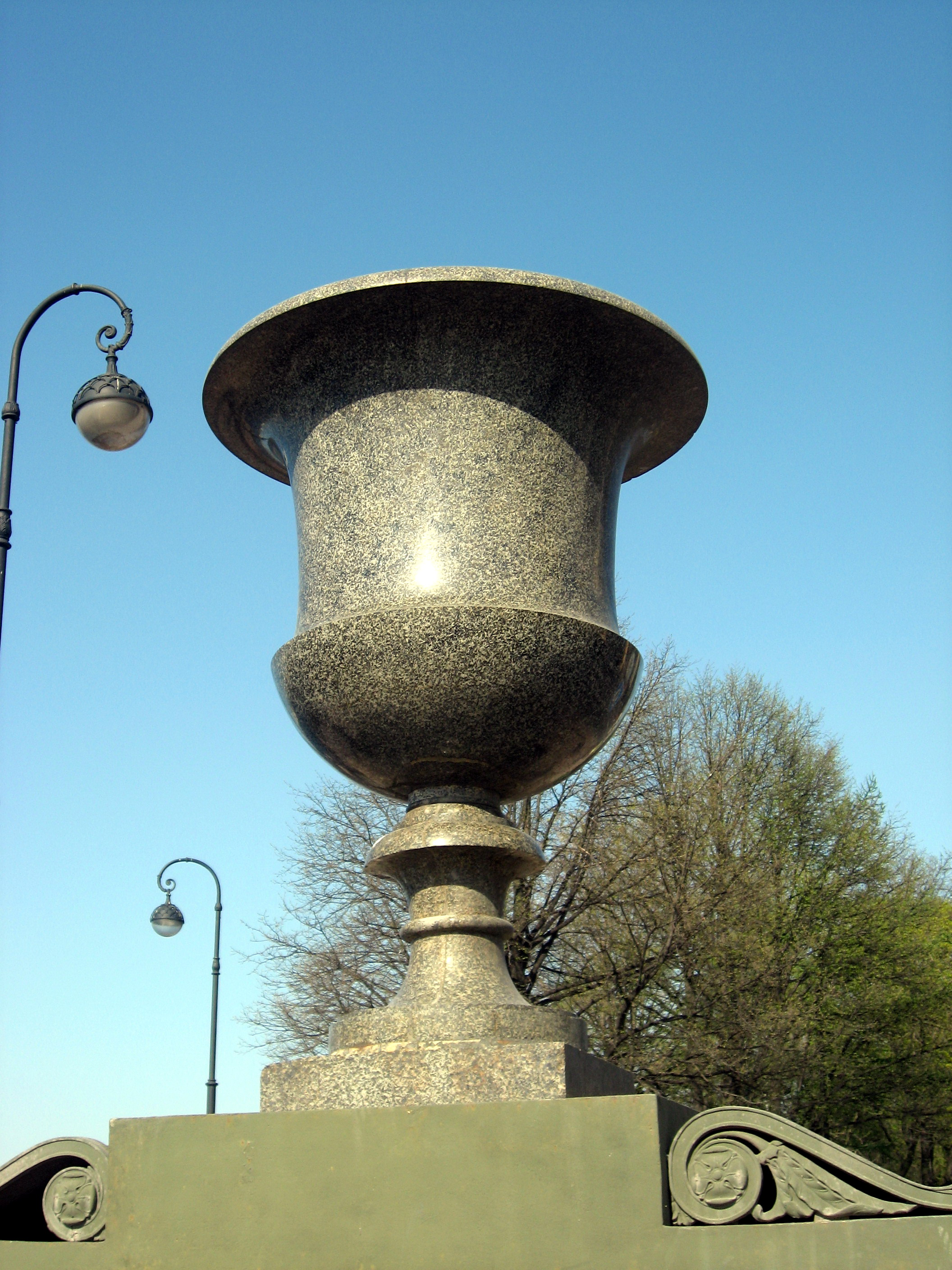 Sankt-Petěrburg